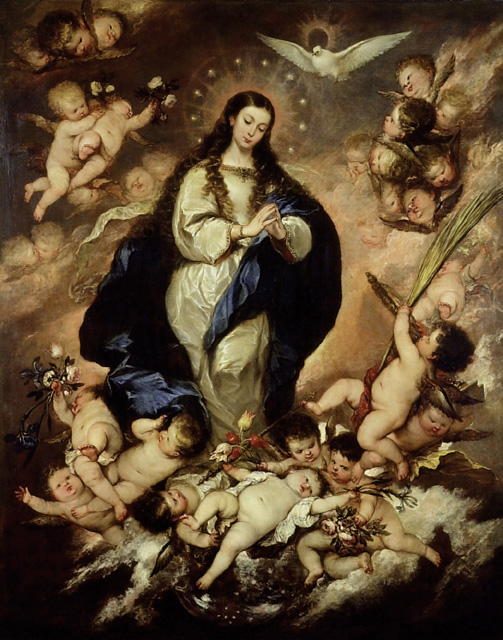 José Antolínez, Inmaculada, óleo sobre lienzo, 213 x 170 cm. Ashmolean Museum, University of Oxford.